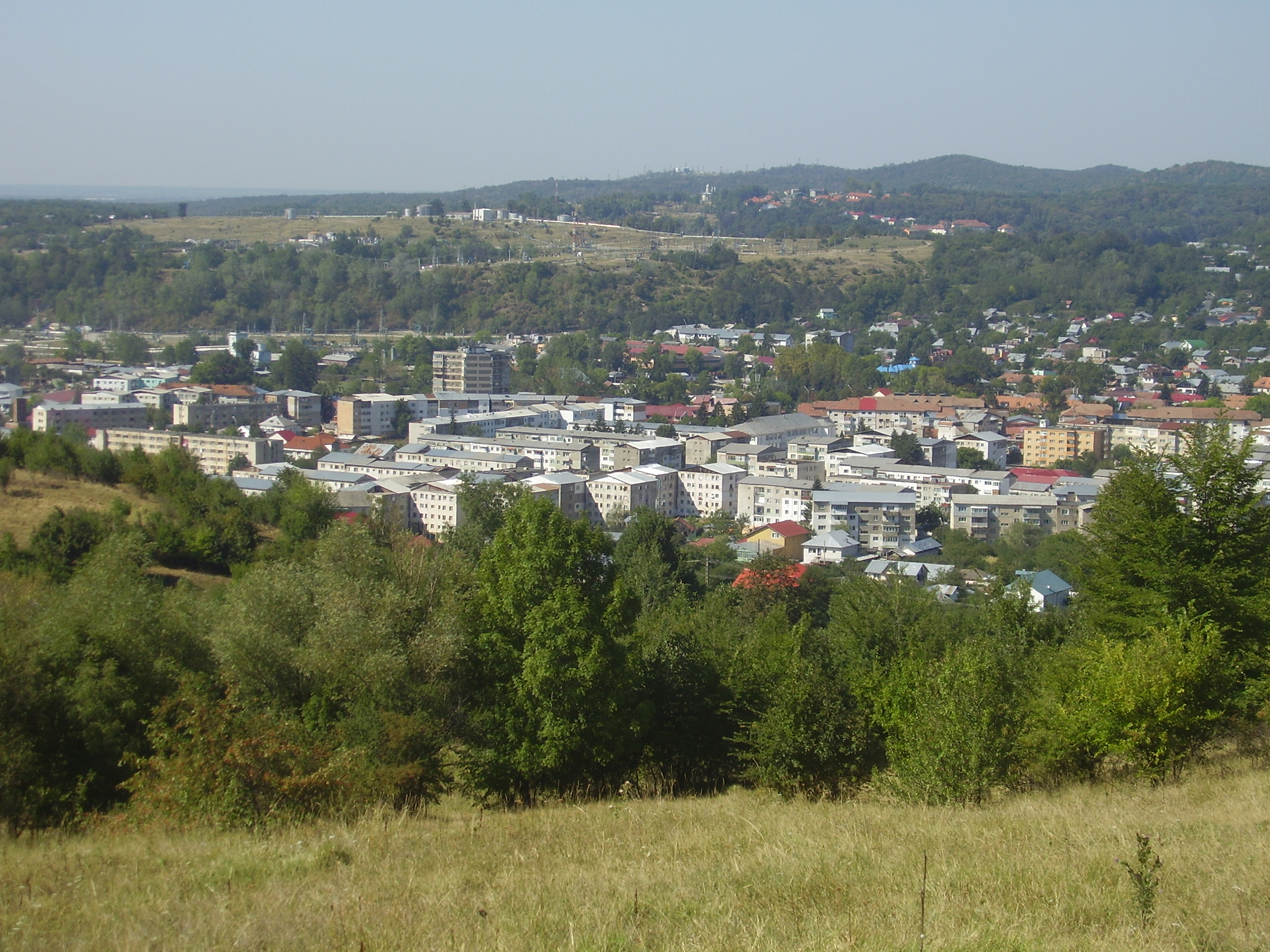 Vedere din centrul municipiului Moreni